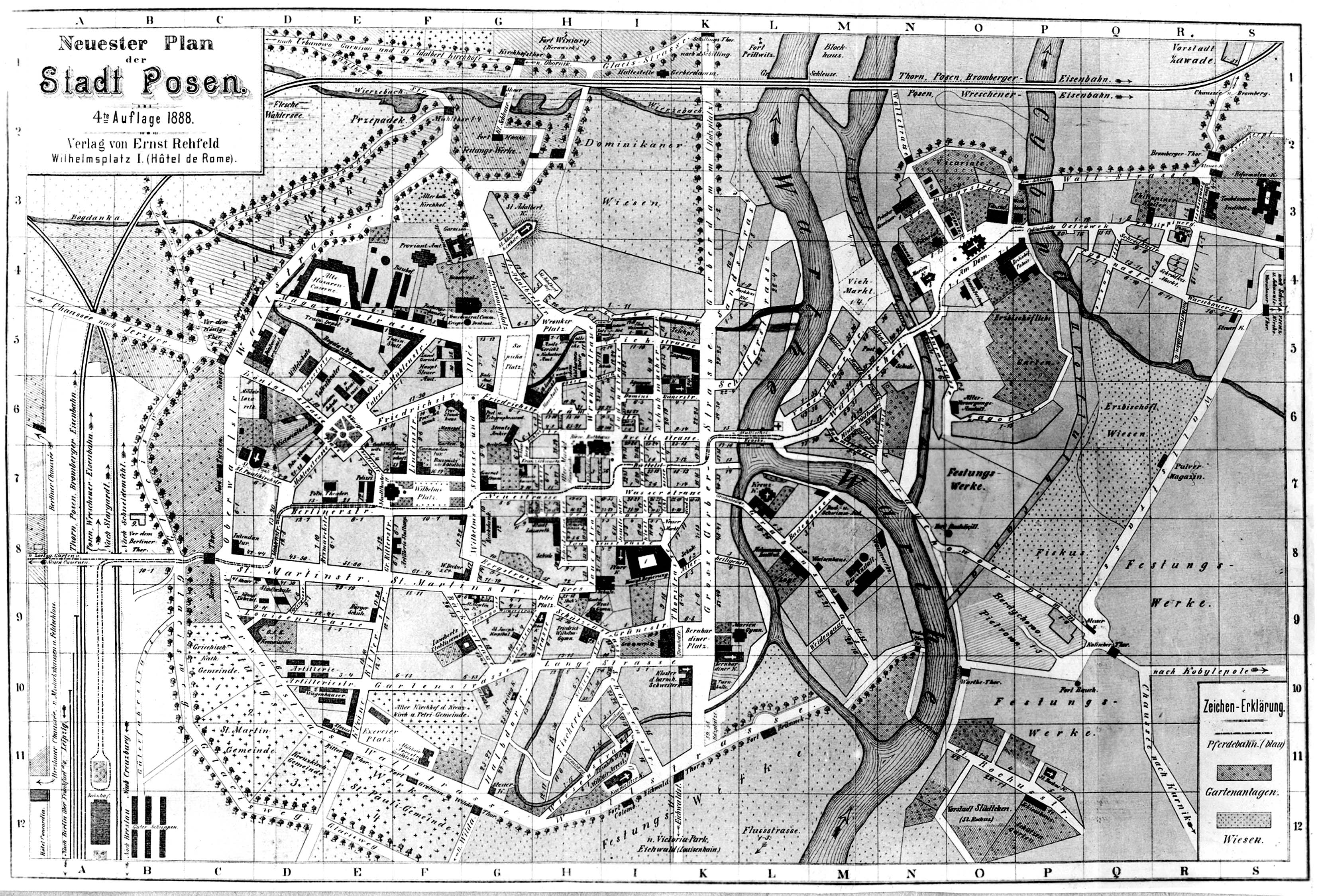 Mapa Poznania z 1888r. Autor: Ernst Rehfeld